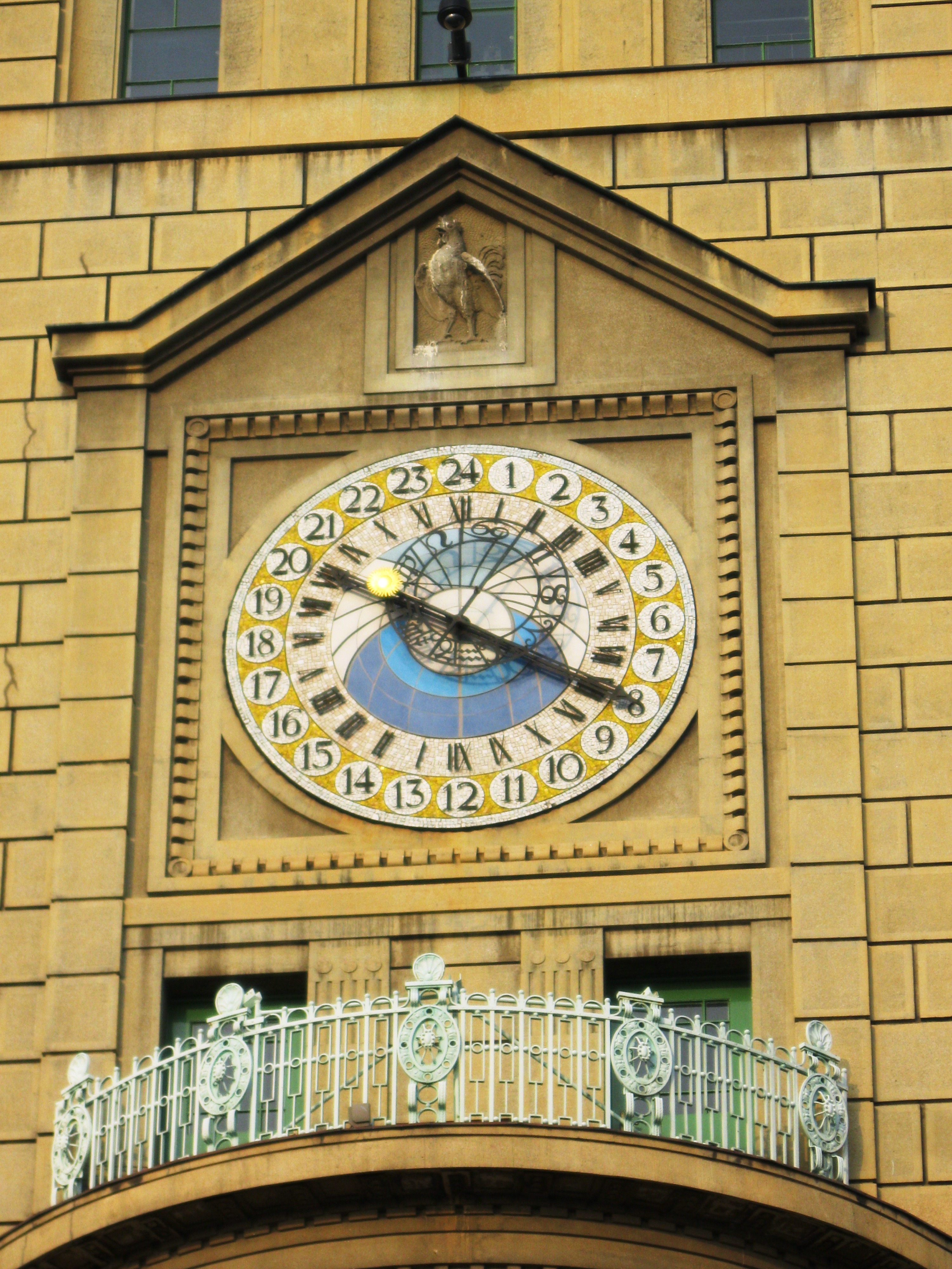 Radnice Nová (Prostějov), nám. T. G. Masaryka 130/13, Prostějov